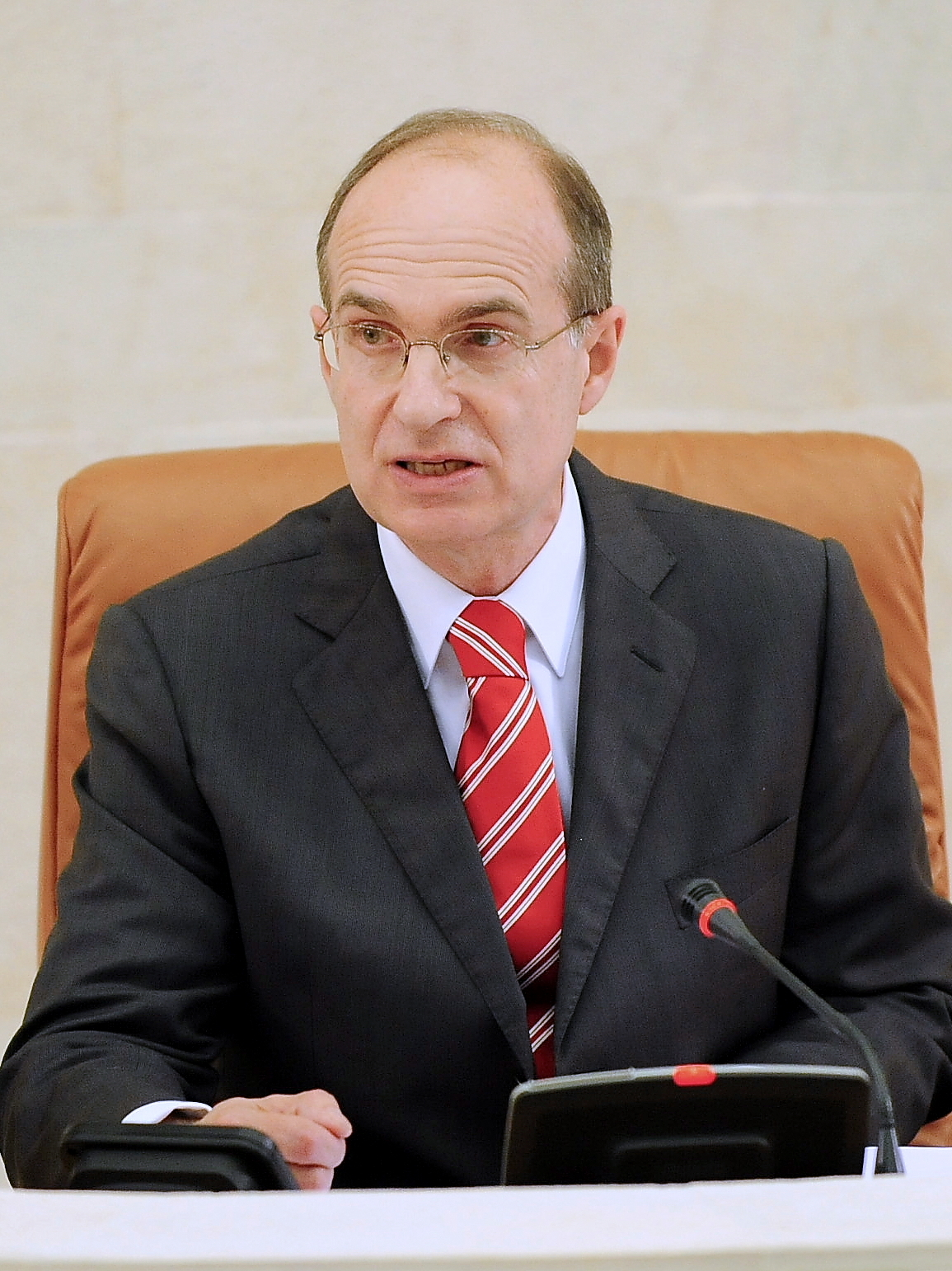 Presidente del Parlamento de Cantabria.